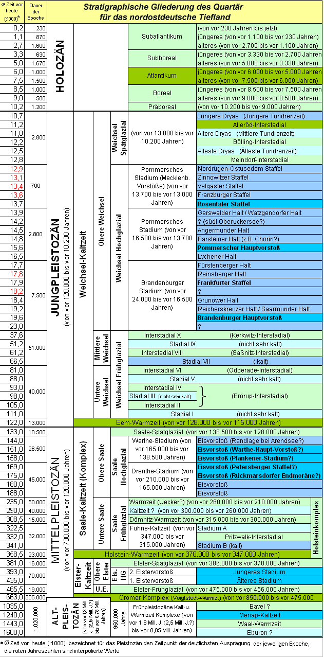 Stratigraphische Gliederung des Quartär Selbst zusammengestellt nach verschiedenen Quellen: Geolog. Atlas von Brandenburg (2003?), Geologie der Region Neubrandenburg (Granitzki (Herausg.) 1998 ISBN 3-9805343-1-6, Wagenbreth/Steiner "Geologische Streifzüge" VEB Deutscher Verlag für Grunstoffindustrie, 2. Aufl. Leipzig 1985. u.v.m erstellt aus eigener Exceltab. und hochgeladen von Botaurus